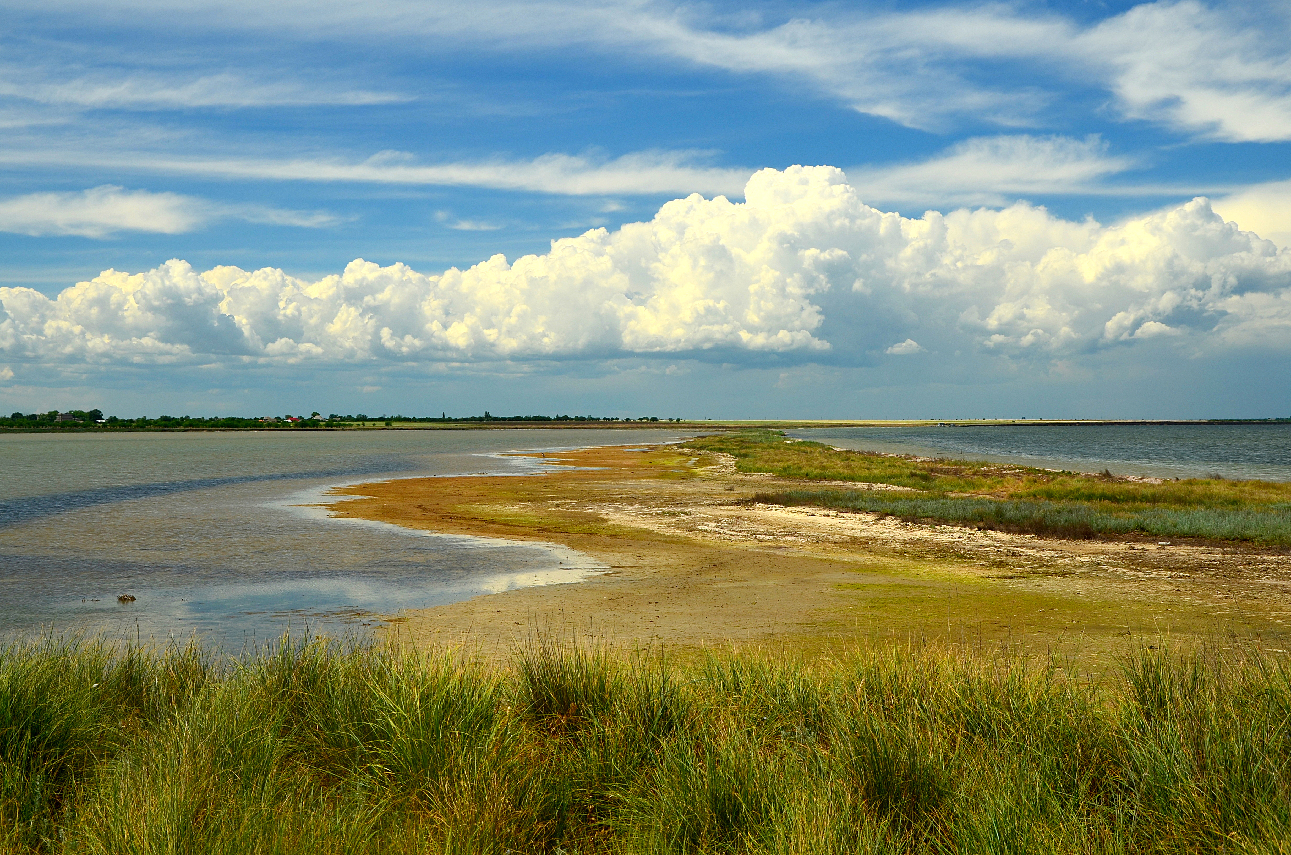 «Тузловські лимани», Татарбунарський район